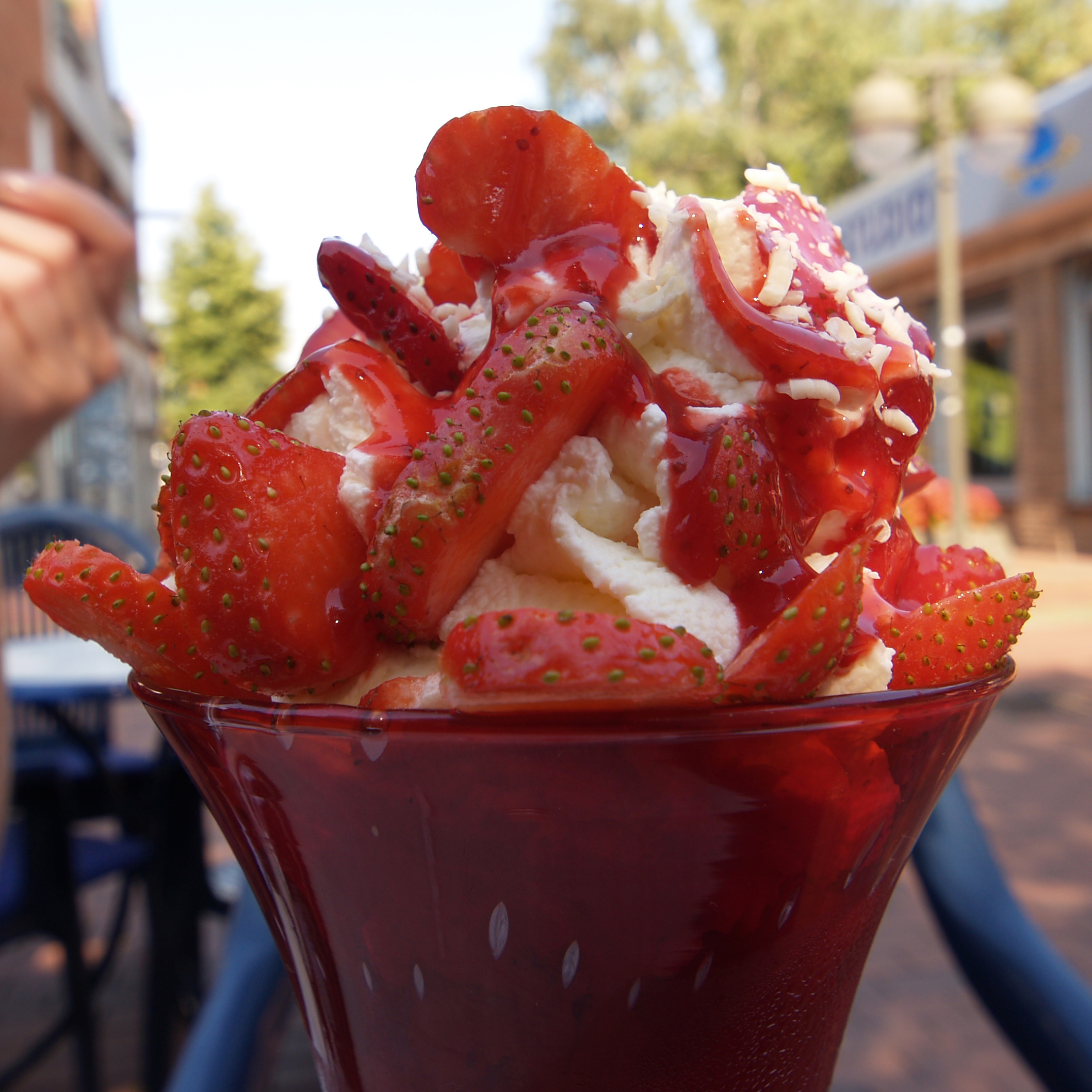 Erdbeereis mit Sahne